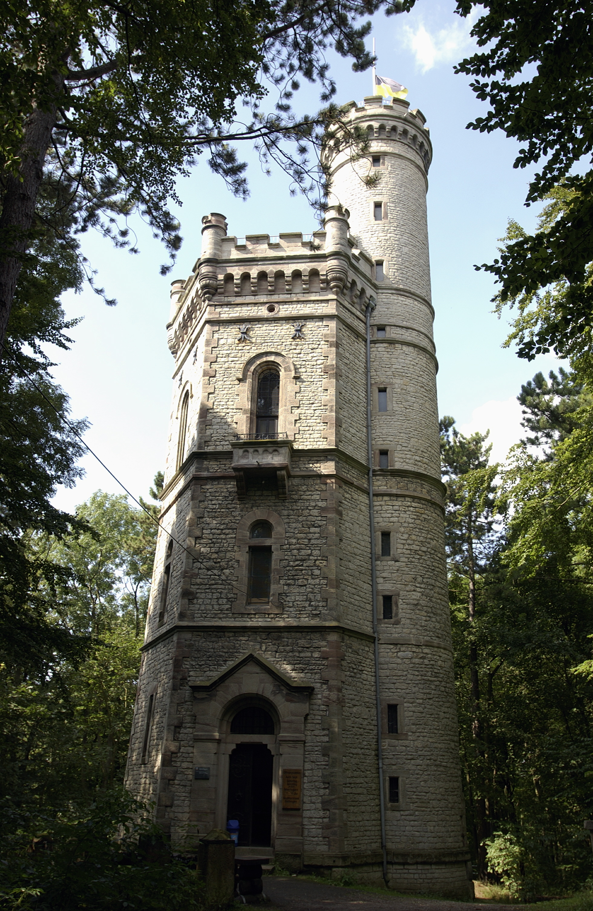 Goettingen, Bismarckturm